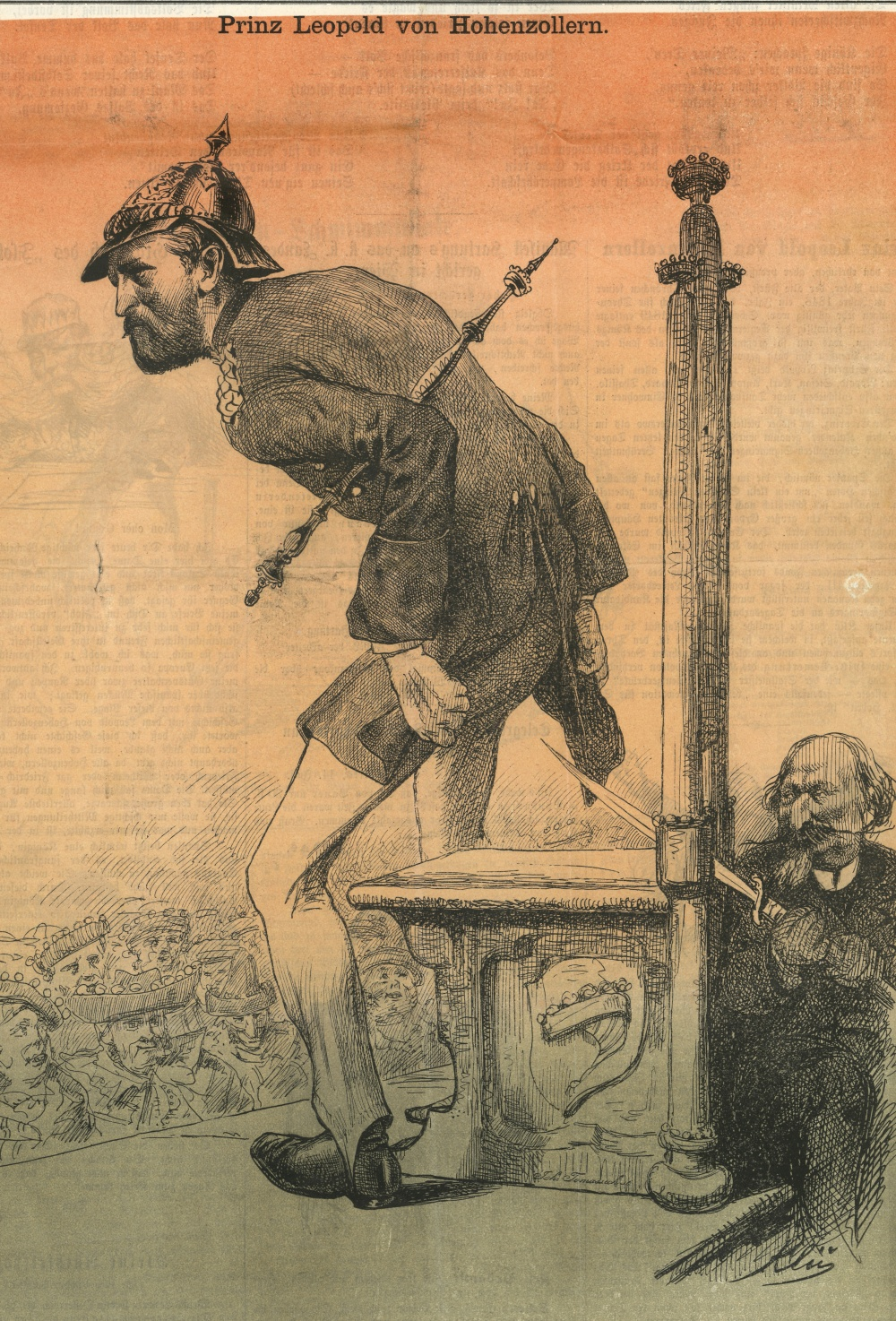 Karikatur zur spanischen Thronkandidatur Erbprinz Leopolds von Hohenzollern in der österreichischen Satirezeitung "Der Floh" vom 19. Juli 1870. (StAS FAS HS1-80 T 7 R 53, 73 (1a)